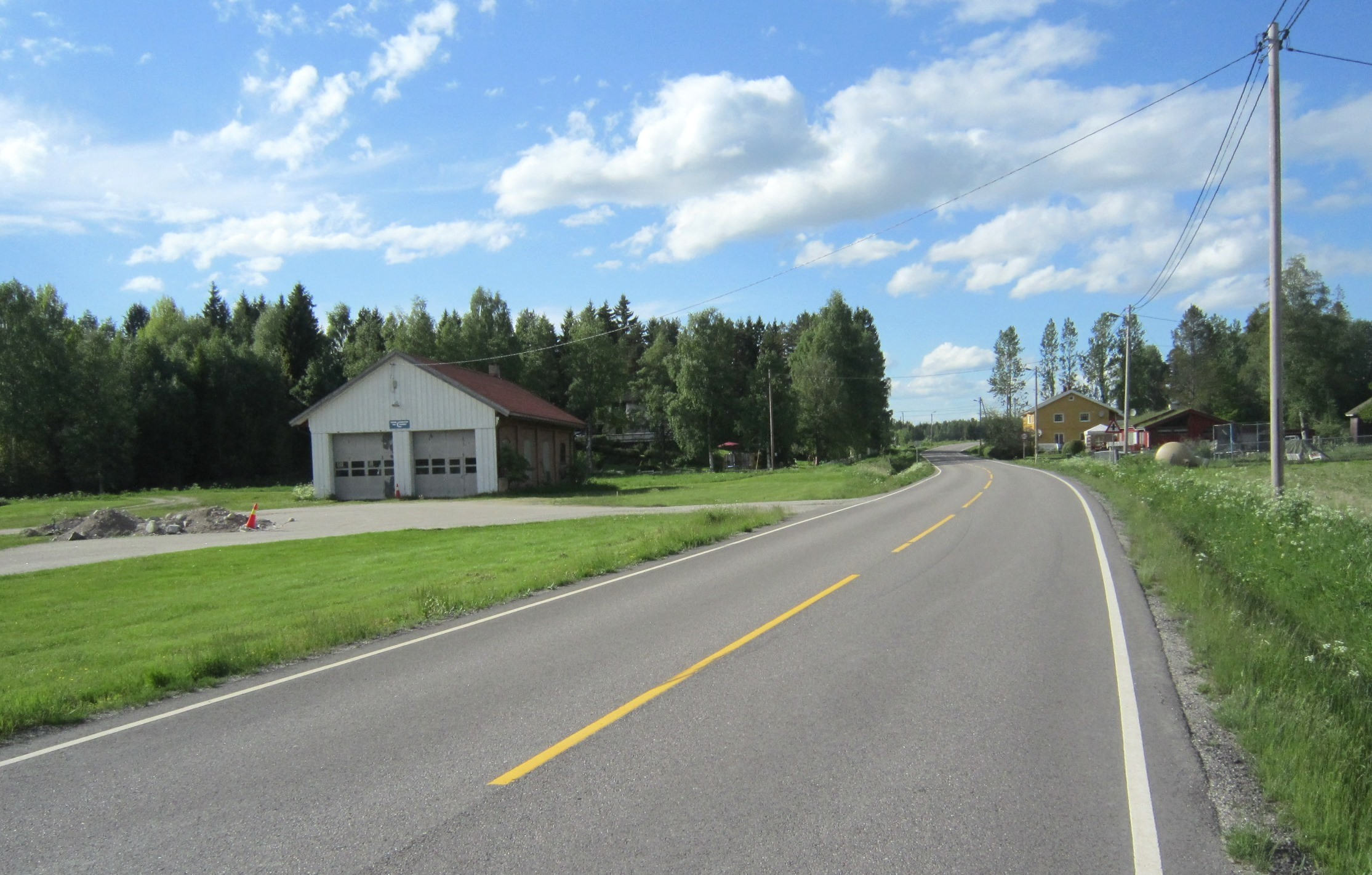 Primær fylkesvei 125 på Skulerud. Til venstre ses lokstallen ved Skulerud stasjon på den nedlagte Urskog-Hølandsbanen.